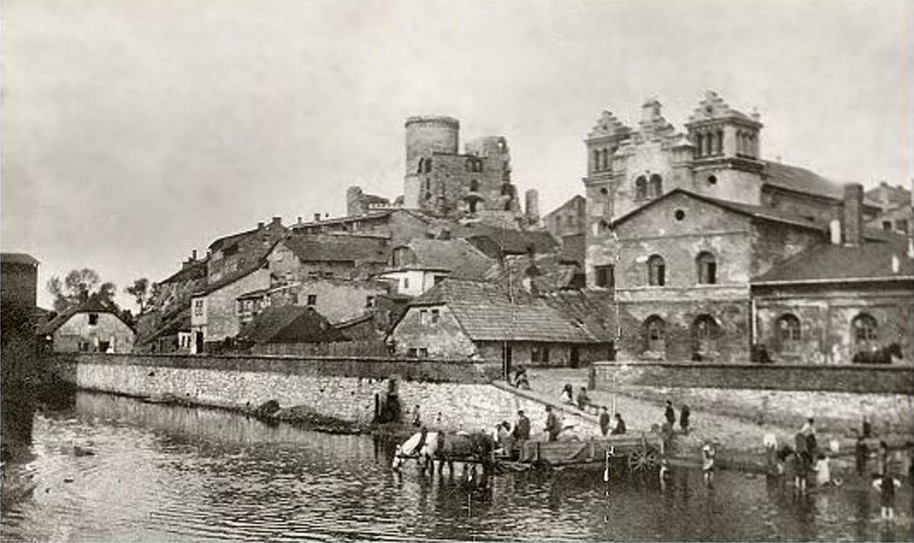 Będzin na starej pocztówce. Widok na zamek w Będzinie i synagogę na początku XX wieku od strony rzeki Czarnej Przemszy Zródło: plWiki, załadowane przez Zuber Grafika pochodzi z Włodzimierza Błaszczyka, Będzin przez wieki. Dzieje miasta i jego rozwoju urbanistyczno-przestrzennego od średniowiecza do połowy XX – wieku na podłożu osadnictwa w starożytności i wczesnym średniowieczu", Poznań 1982